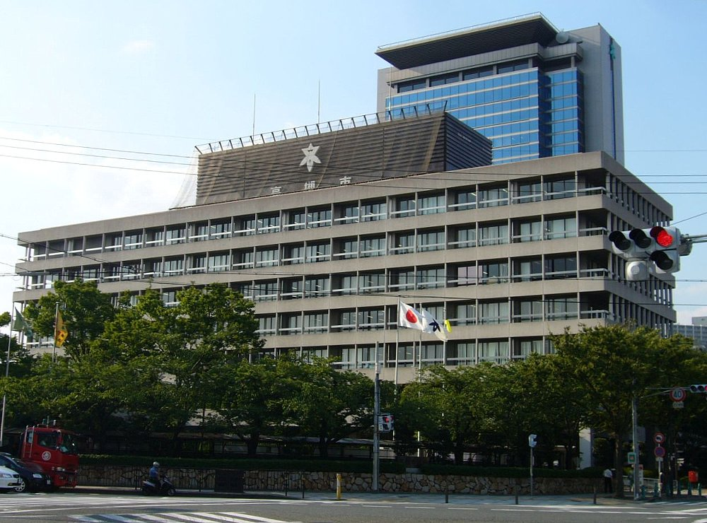 Takatsuki City Hall in Osaka-fu, Japan